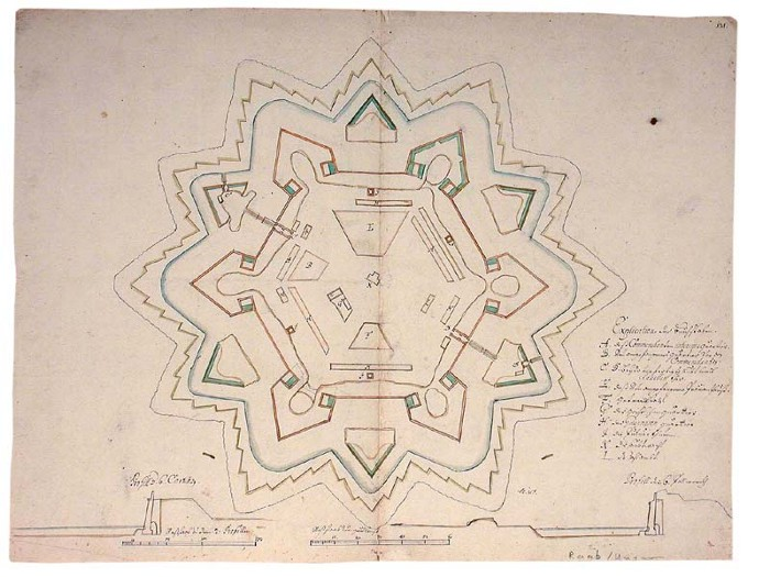 Lipótvár (ma Szlovákia) alaprajza